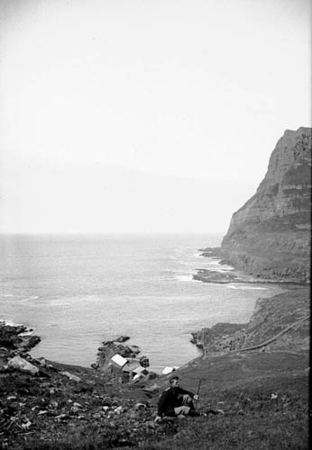 Hvalba, Hvalbiareiði or Fiskieiði, Faroe Islands